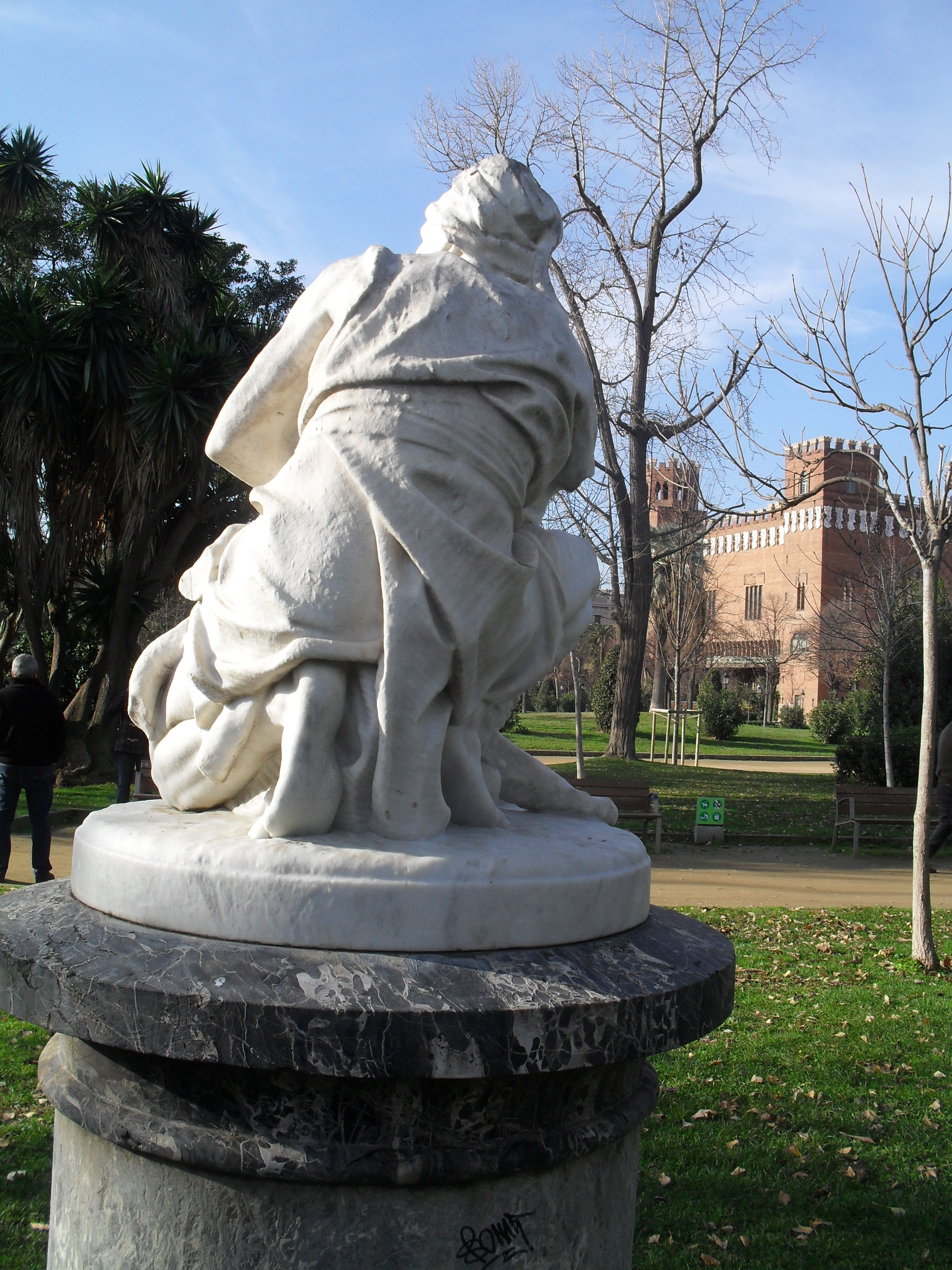 caçador de lleons al Parc de la Ciutadella, vista d'esquenes